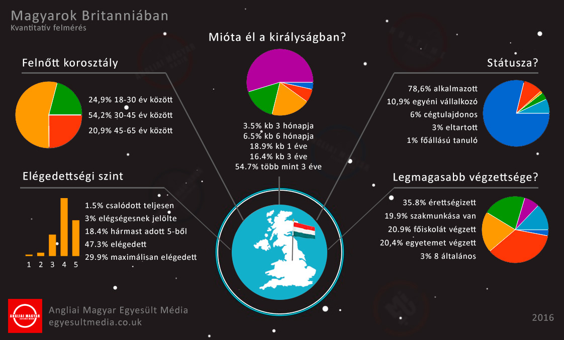 Kvantitatív felmérés a Nagy-Britanniában élő magyarokkal 2016